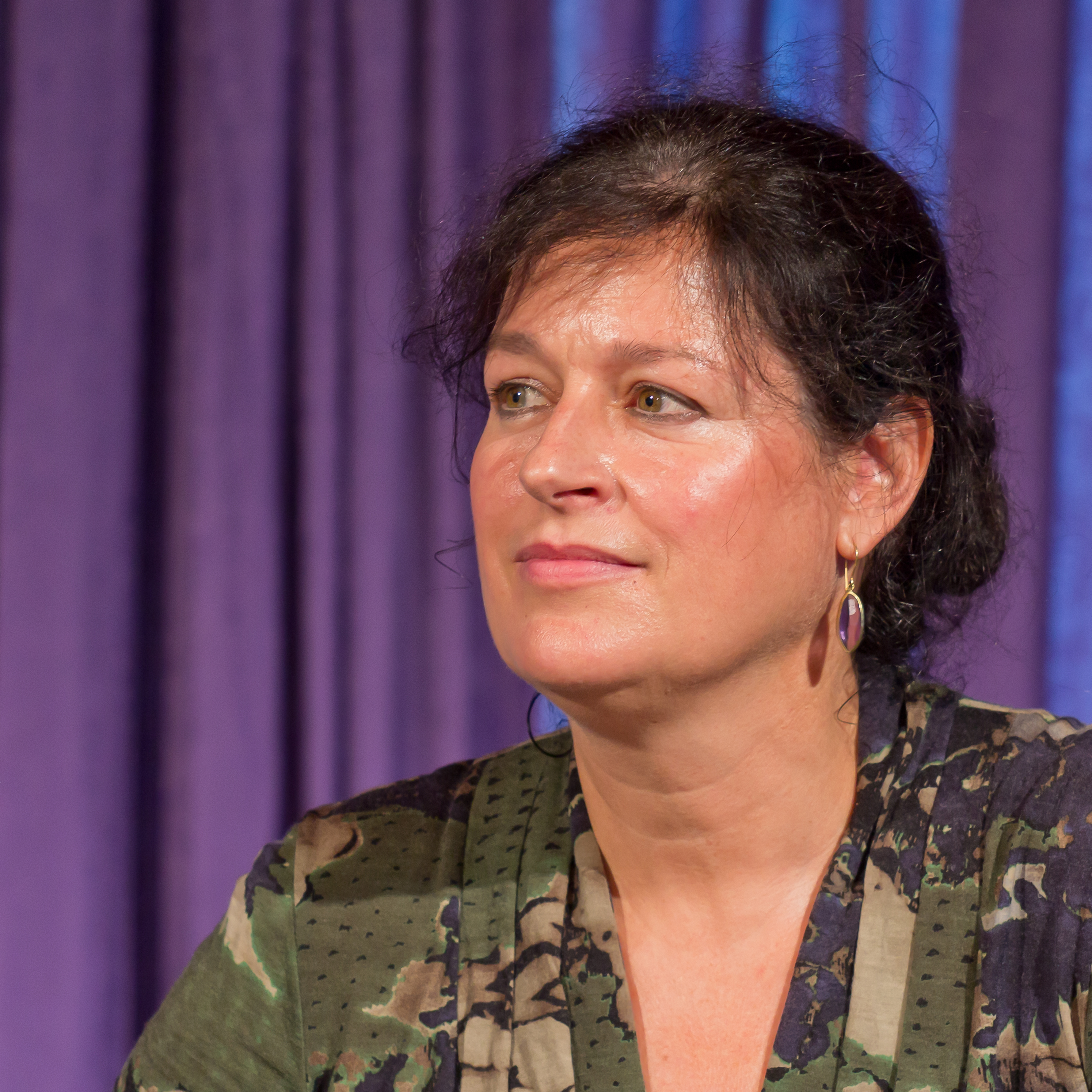 In einem Pressegespräch in der „Oper am Dom“ (dem früheren Musical Dome) präsentiert Kölns Beigeordneter für Kunst und Kultur, Prof. Georg Quander, die neue Opernintendantin Dr. Birgit Meyer. Beide unterzeichnen den Anstellungsvertrag, und Dr. Meyer informiert über die aktuelle Situation und die weiteren Pläne der Oper Köln. Foto: Birgit Meyer